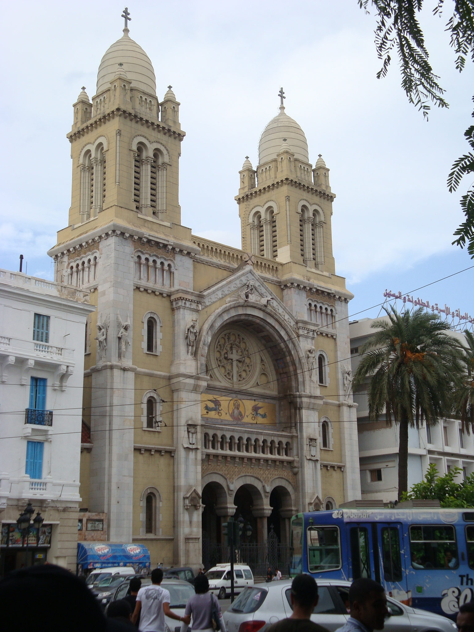 katedra św. Wincentego